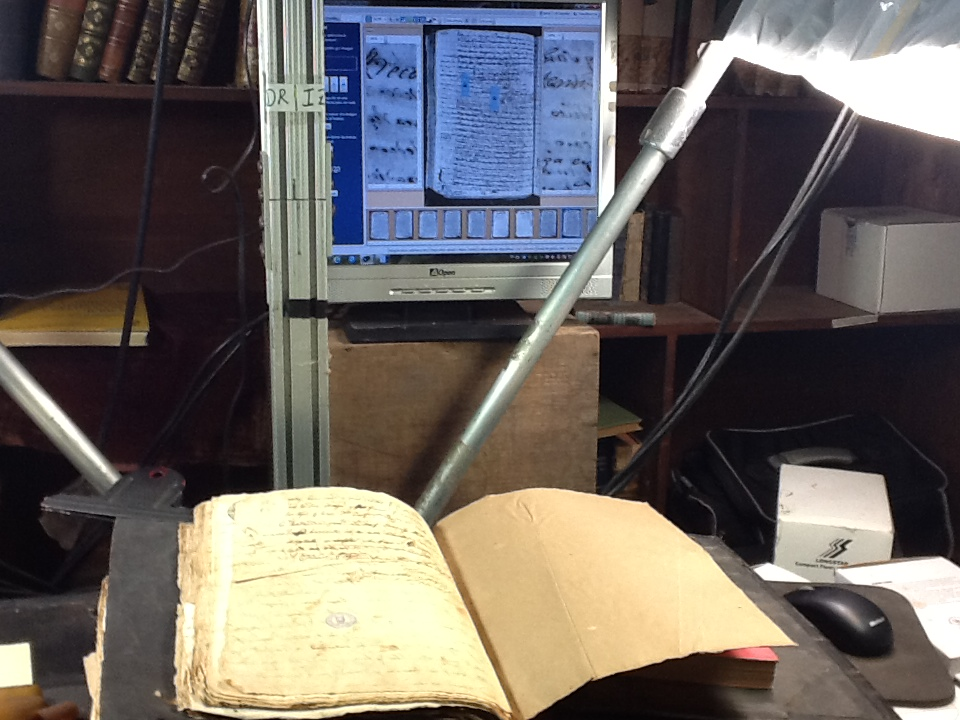 Digitalización de libros de la academia de historia de Buga